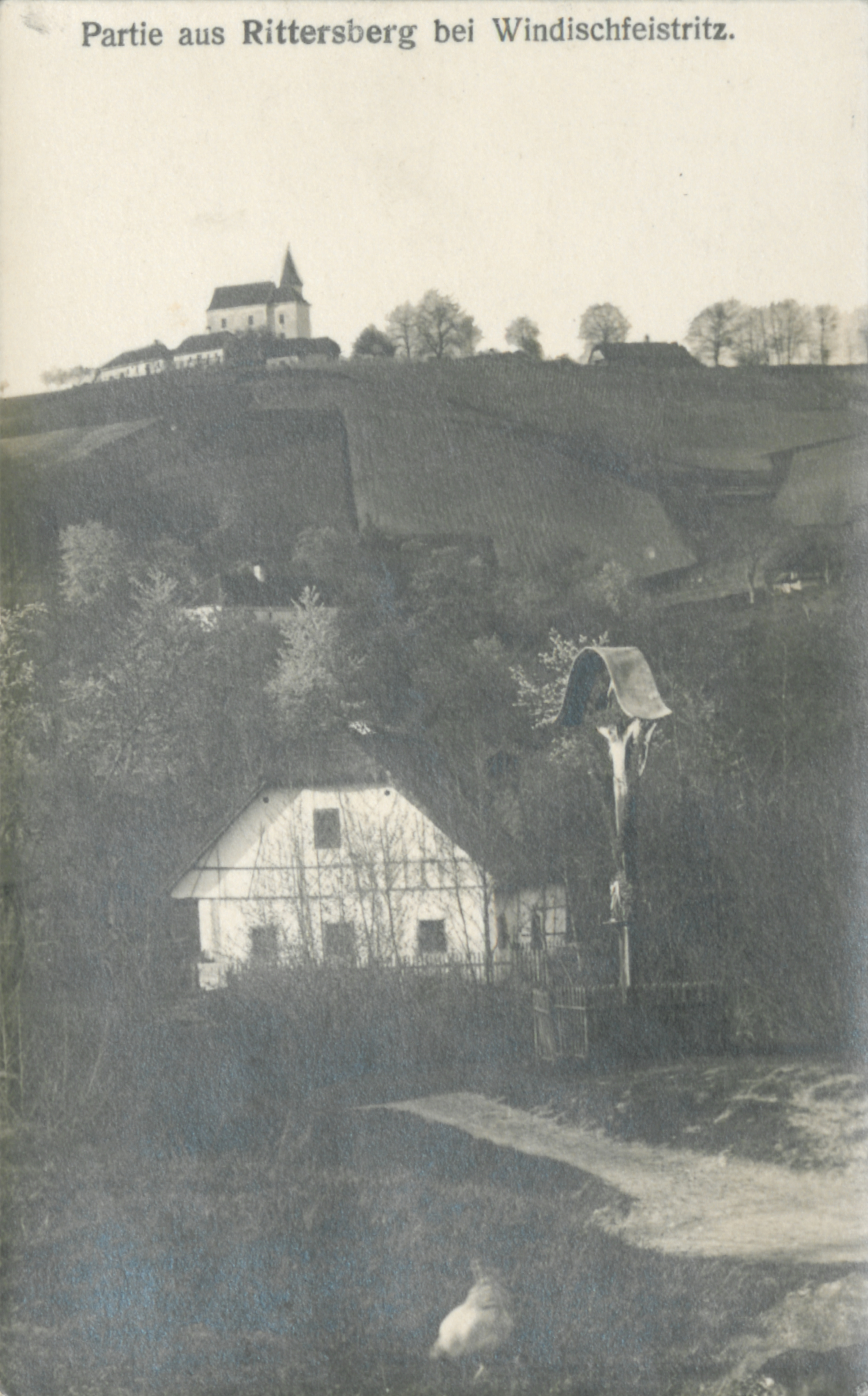 Razglednica Ritoznoja.